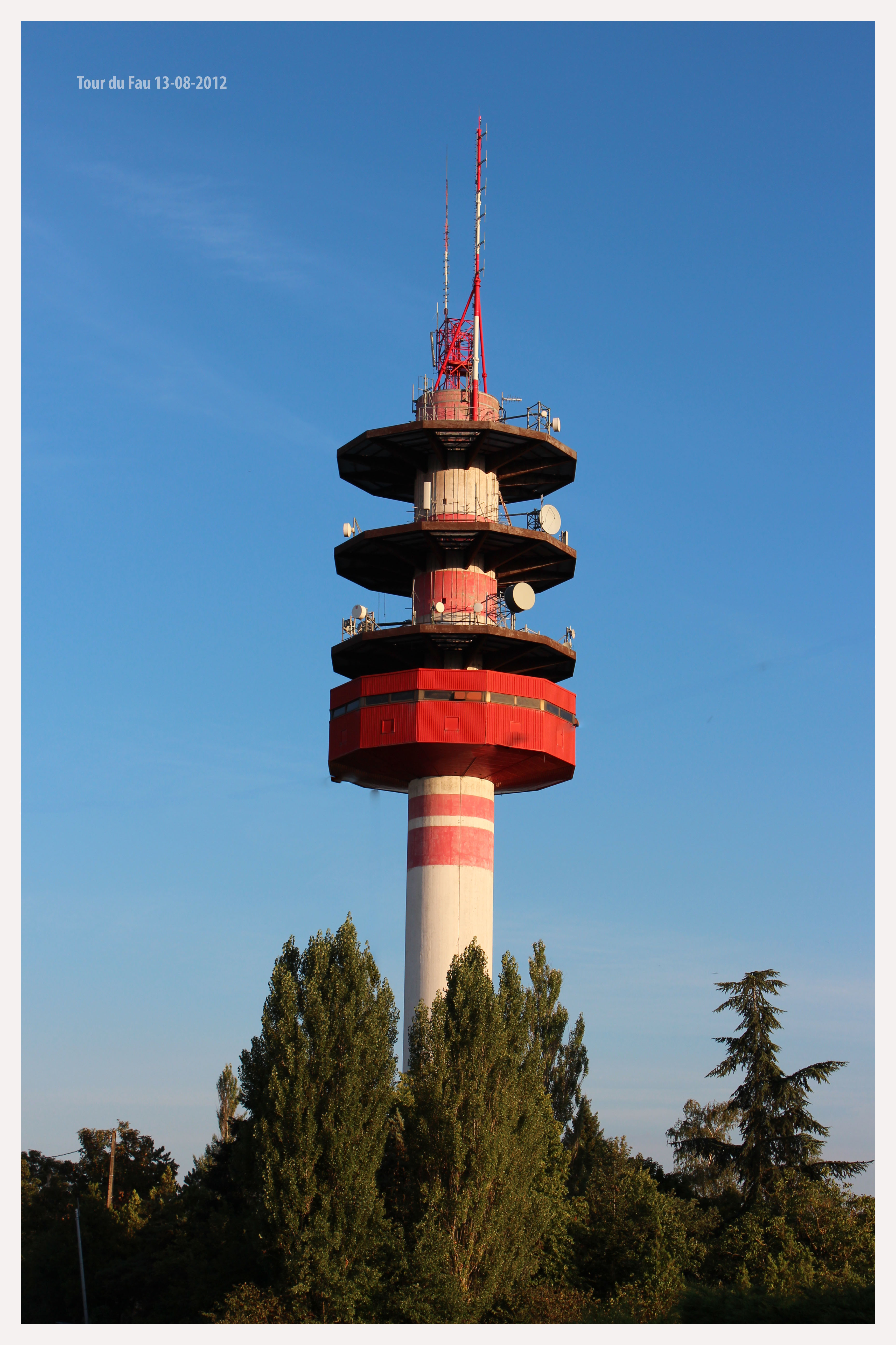 Tour du fau route de Vignarnaud(82)